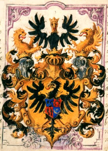 Herb z przywileju Ferdynanda I dla Mikołaja Radziwiłła potwierdzający dziedziczny tytuł książęcy z dnia 14 XII 1547 roku